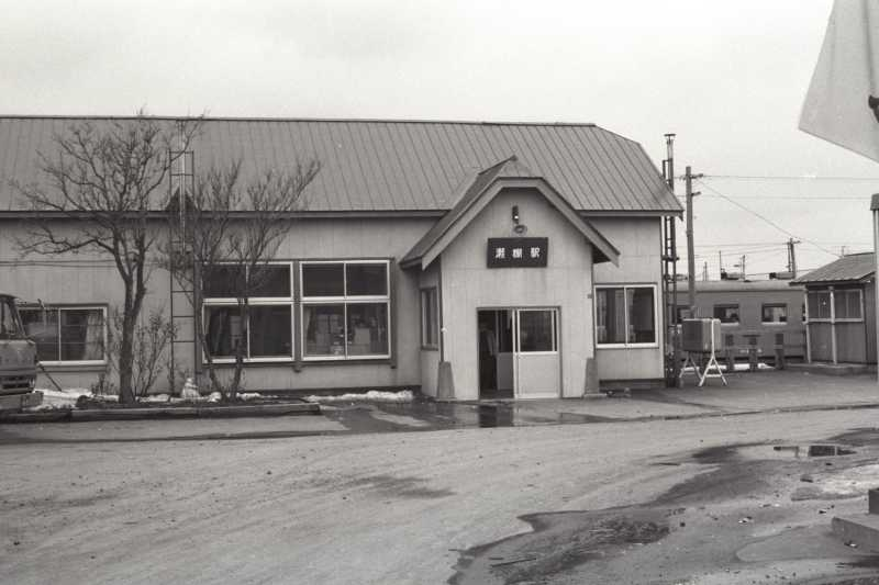 JNR Setana Sta. JNR Setana Line, Hokkaido.